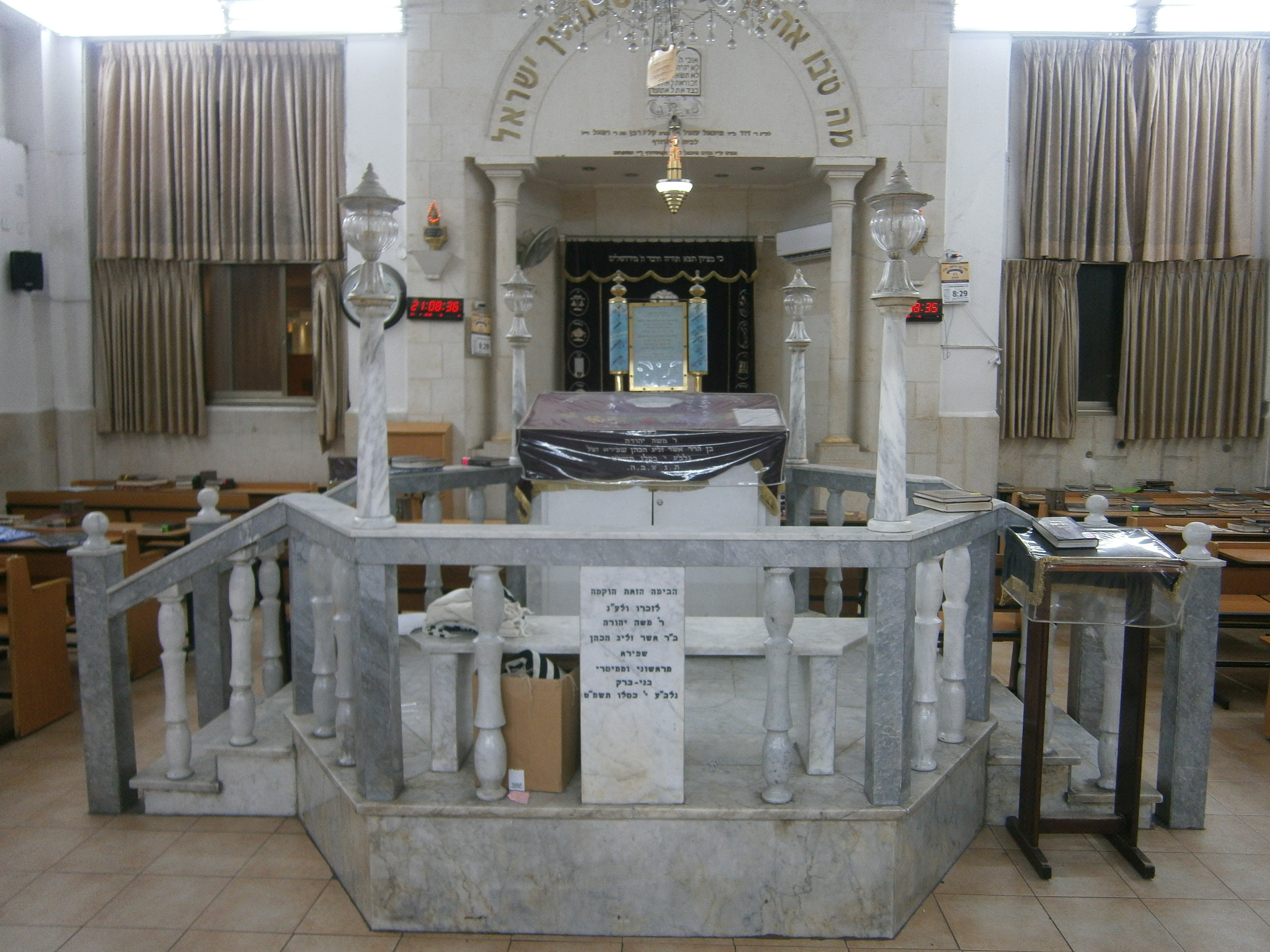 האולם המרכזי בבית הכנסת הגדול הישן בבני ברק